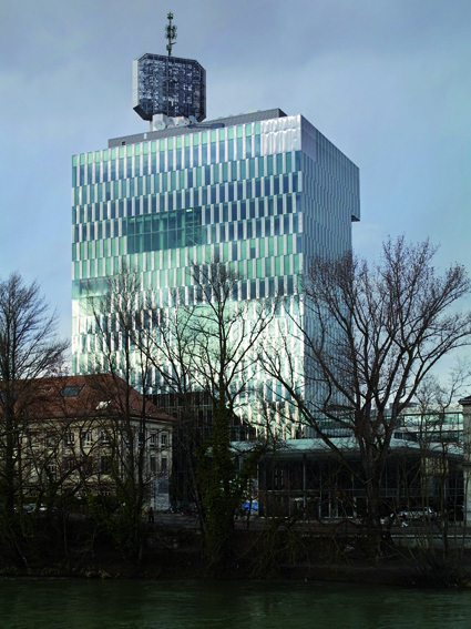 TSR 2010